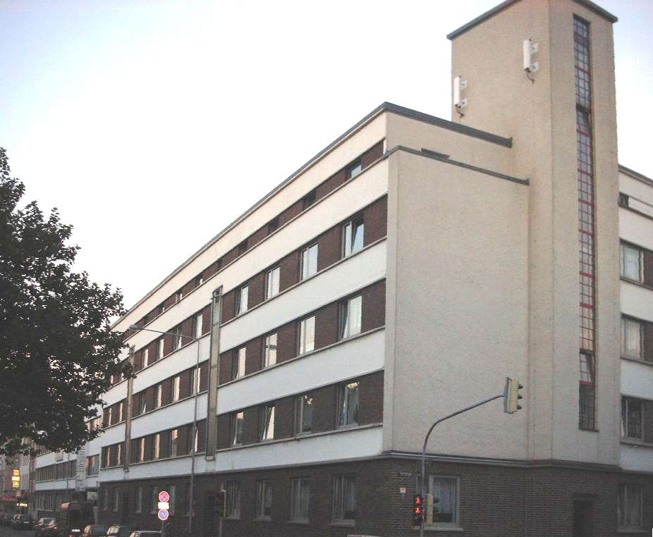 Aachen, "Opelhaus" an der Jülicher Str., war in der Weimarer Republik als Werkstatt und Parkhaus am Ende der Autobahn geplant, dann kam es aber anders.